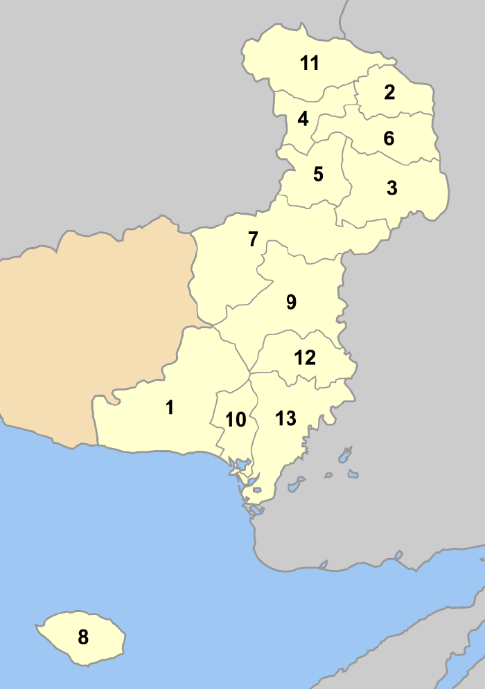 Map of Evros prefecture (Greece) with administrative divisions (municipalities) numbered in alphabetical order (in greek). Legend: 1. Δήμος Αλεξανδρούπολης - Alexandroupolis 2. Δήμος Βύσσας - Vyssa 3. Δήμος Διδυμοτείχου - Didymoticho 4. Δήμος Κυπρίνου - Kyprinos 5. Δήμος Μεταξάδων - Metaxades 6. Δήμος Ορεστιάδος - Orestiada 7. Δήμος Ορφέα - Orfeas 8. Δήμος Σαμοθράκης - Samothraki 9. Δήμος Σουφλίου - Soufli 10. Δήμος Τραϊανούπολης - Traianoupoli 11. Δήμος Τριγώνου - Trigono 12. Δήμος Τυχερού - Tychero 13. Δήμος Φερών - Feres